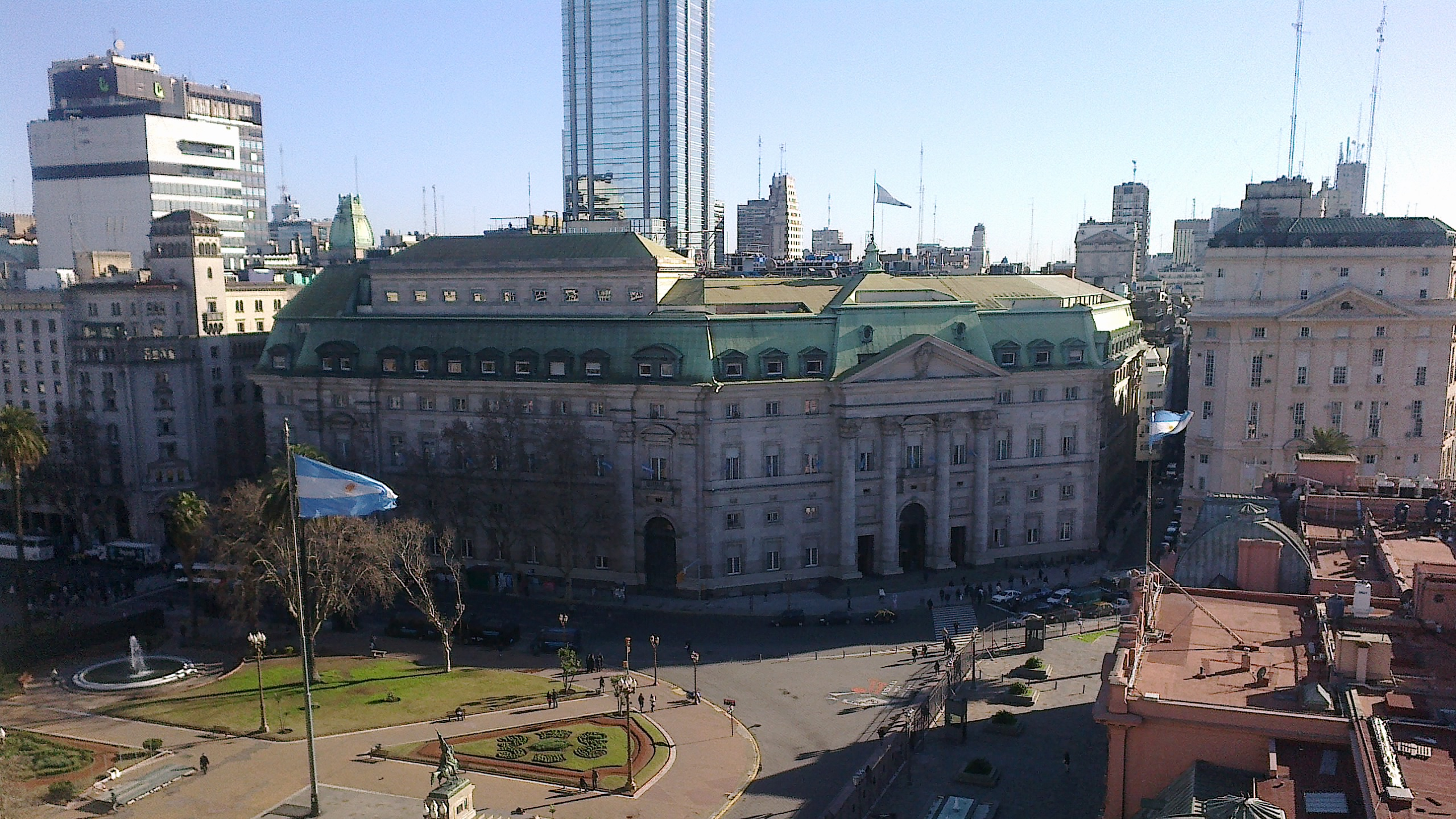 Banco de la Nación Argentina, Casa Central y Sucursal Plaza de Mayo, Buenos Aires, Argentina. Edificio proyectado por Alejandro Bustillo.